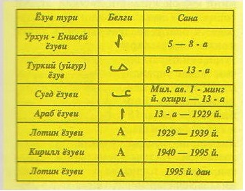 Oʻzbekcha/ўзбекча: A harfi etimologiyasi